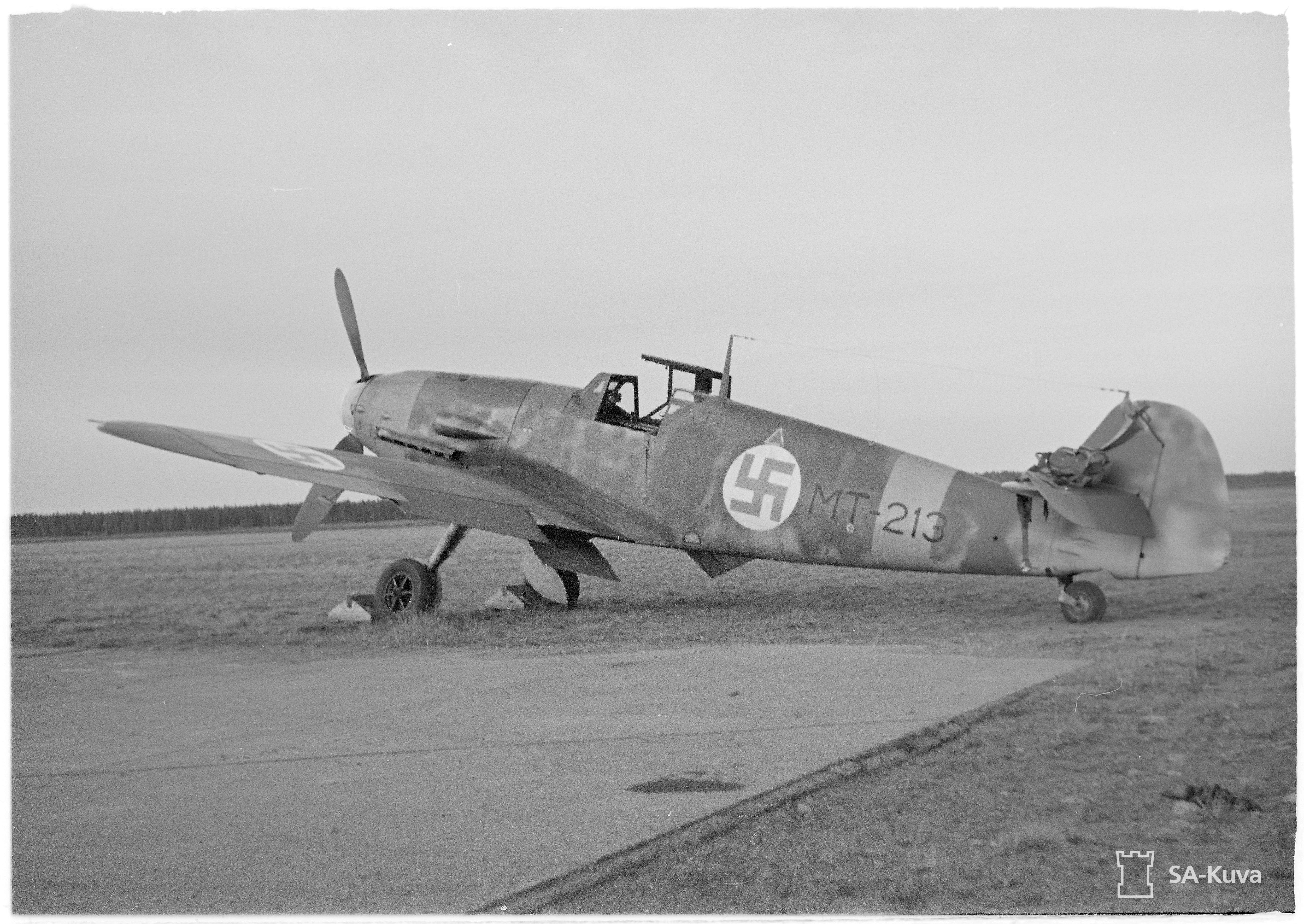 MT-kone. (Kuvassa on Messerschmitt Bf 109 G-2 (tunnus MT-213)). Kuvauspaikka: Utin lentokenttä